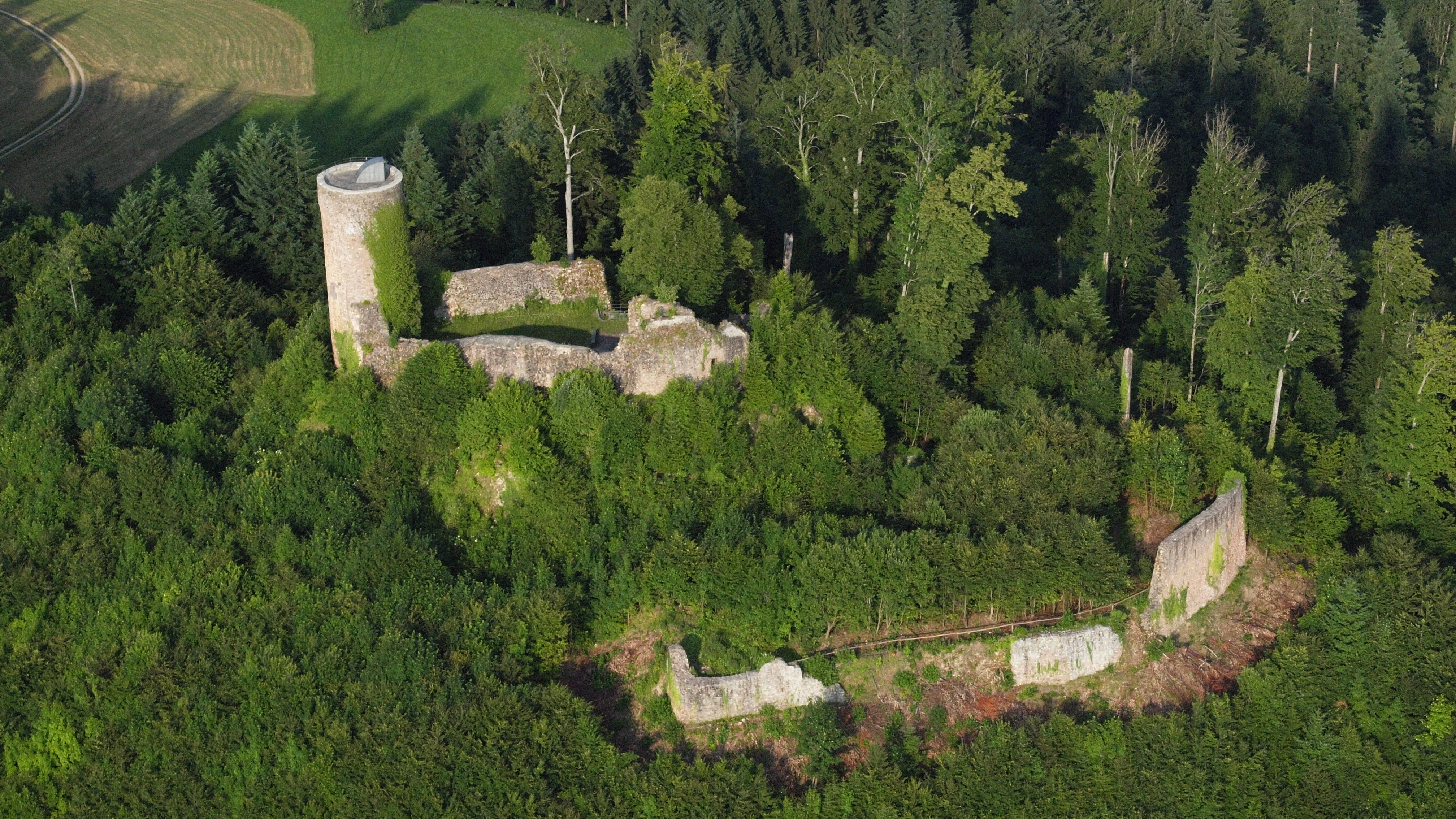 Sausenburg, Kandern: Luftaufnahme